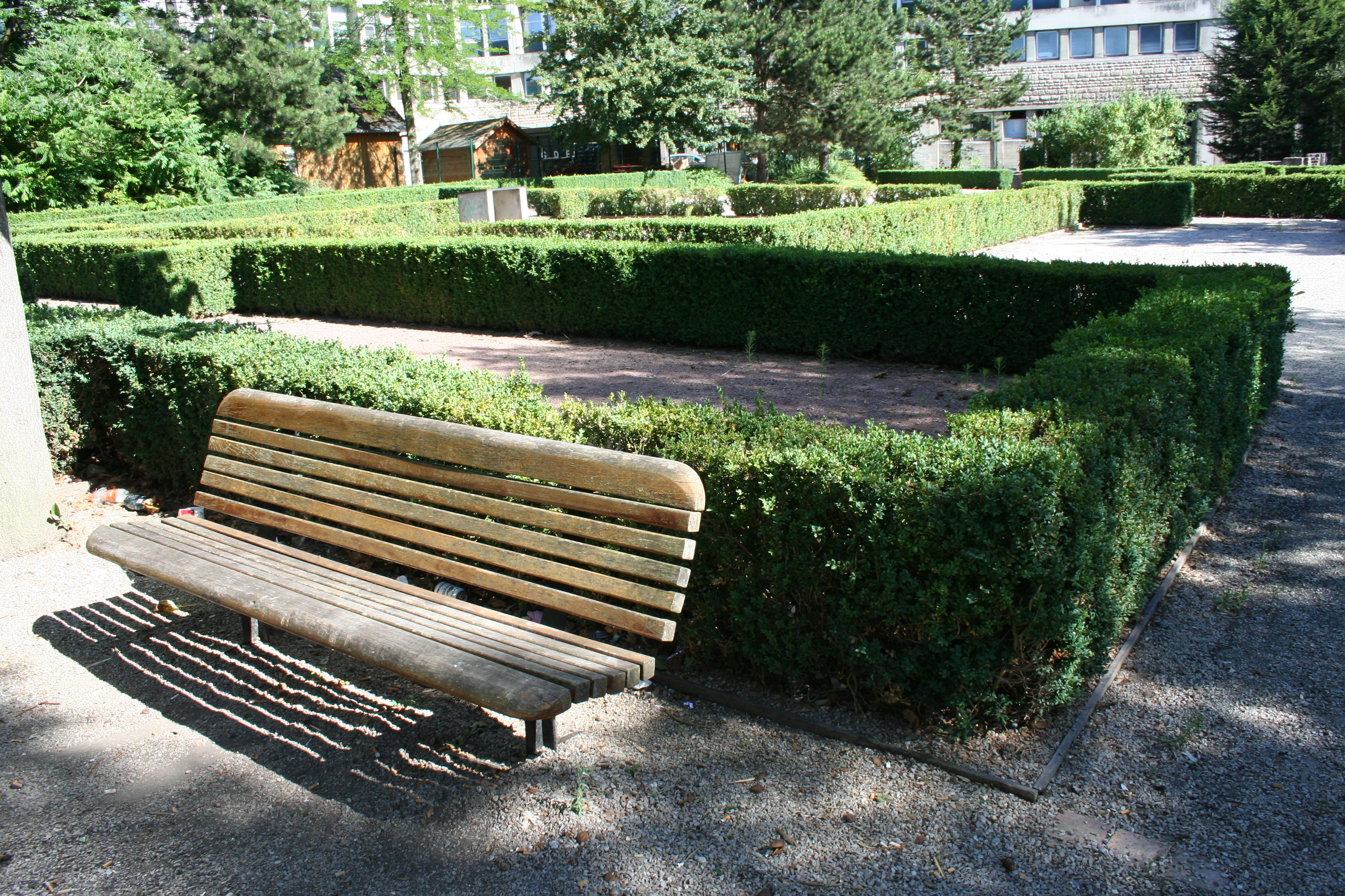 jardin de l'hopital de Lisieux